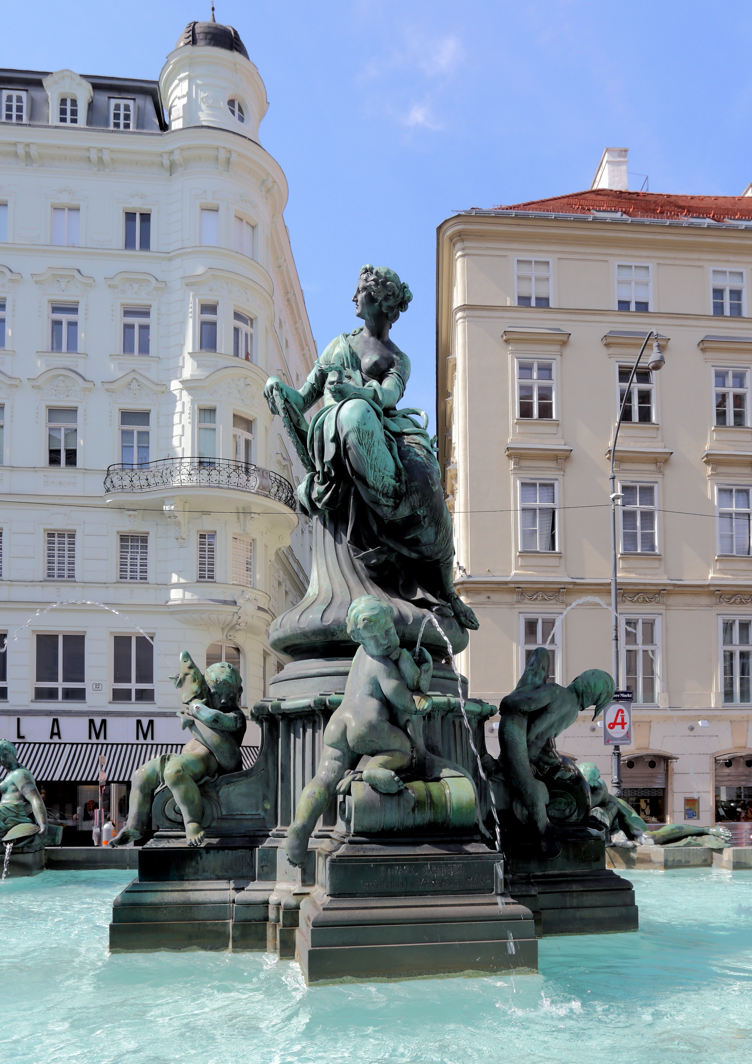 Der Donnerbrunnen (eigentlich Providentia-Brunnen) mit der Zentralfigur Providentia am Neuen Markt in der österreichischen Bundeshauptstadt Wien. Der Brunnen wurde von 1737 bis 1739 von Georg Raphael Donner errichtet.